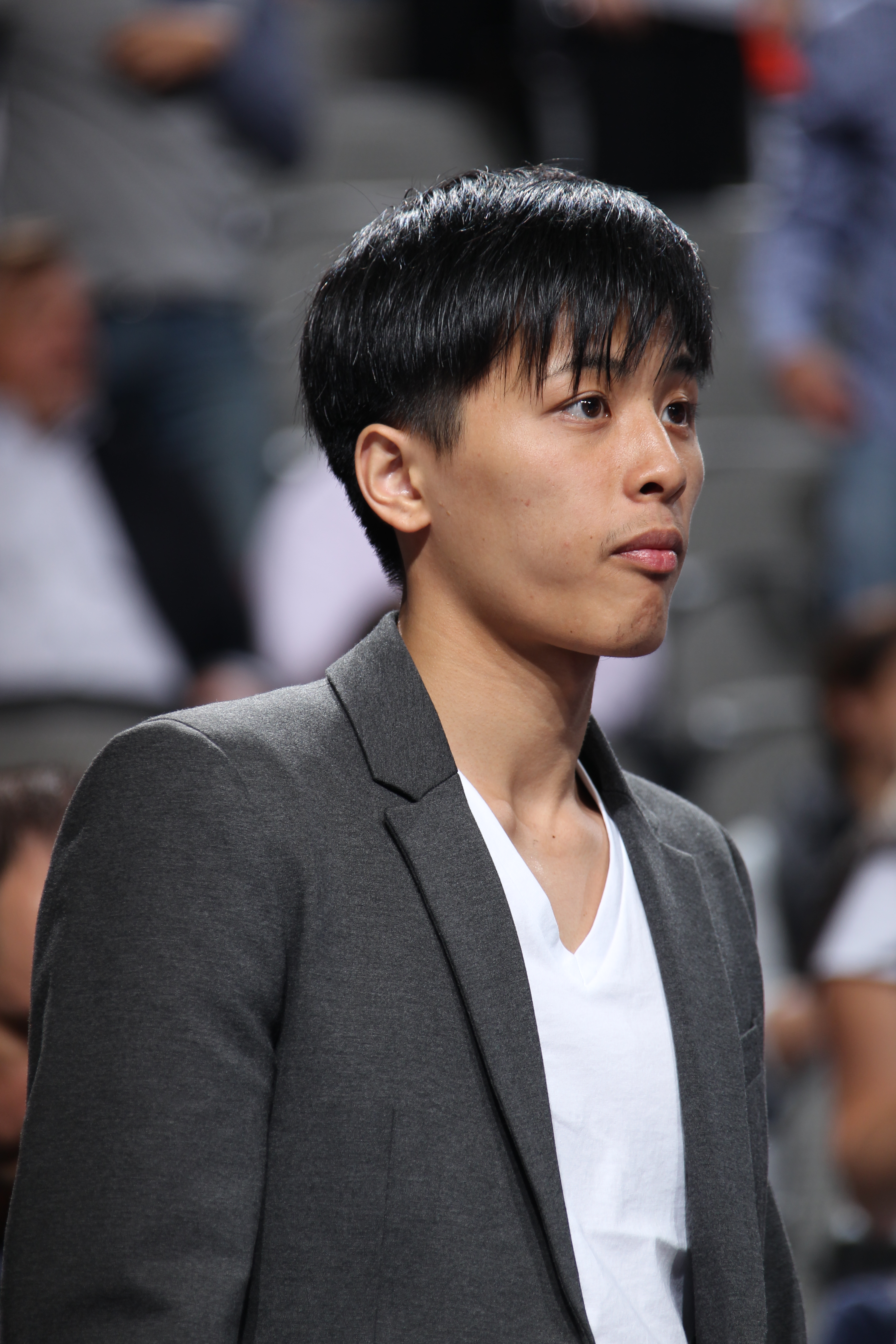 Yuki Togashi